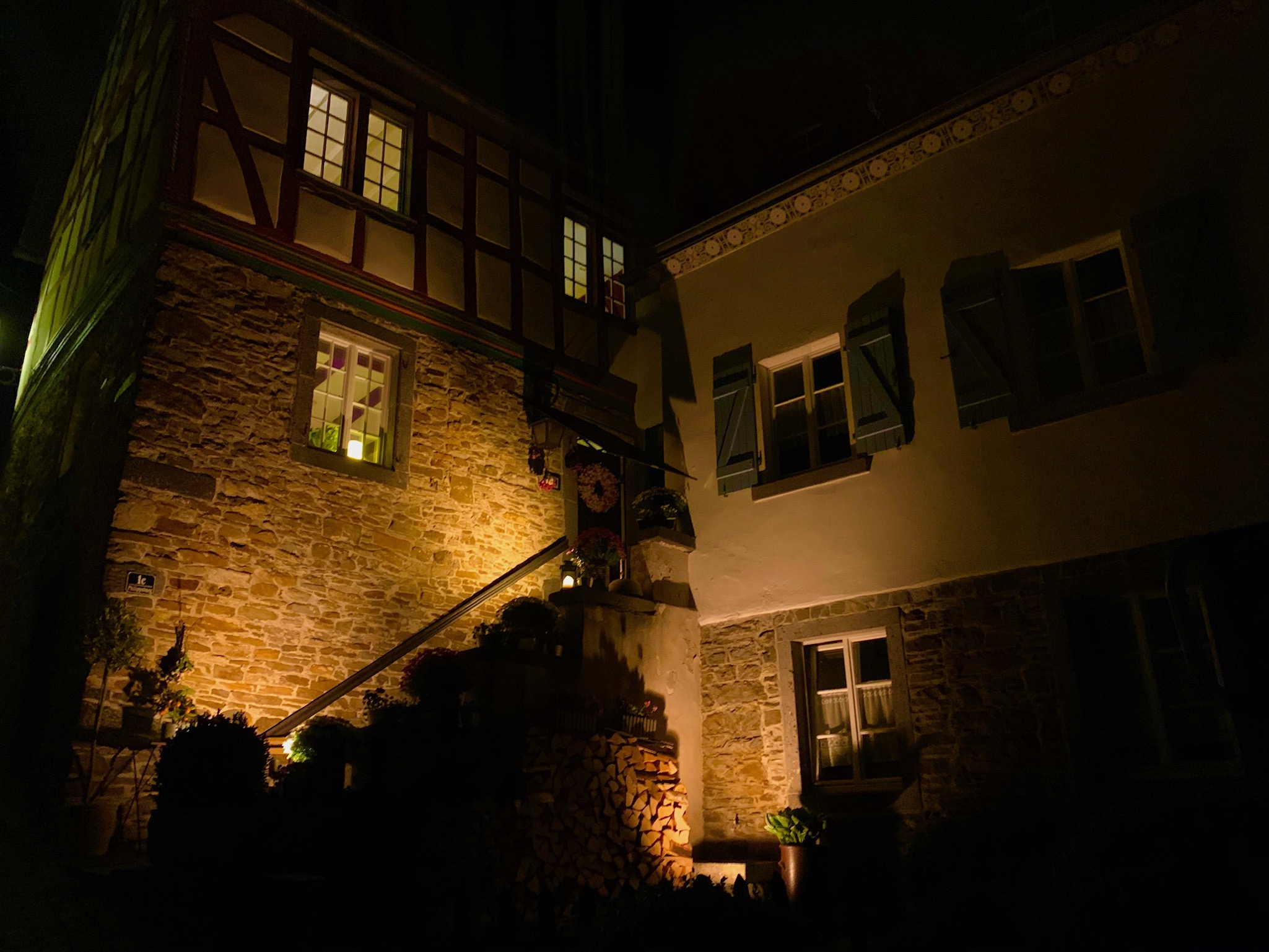 Beleuchtetes Fachwerkhaus